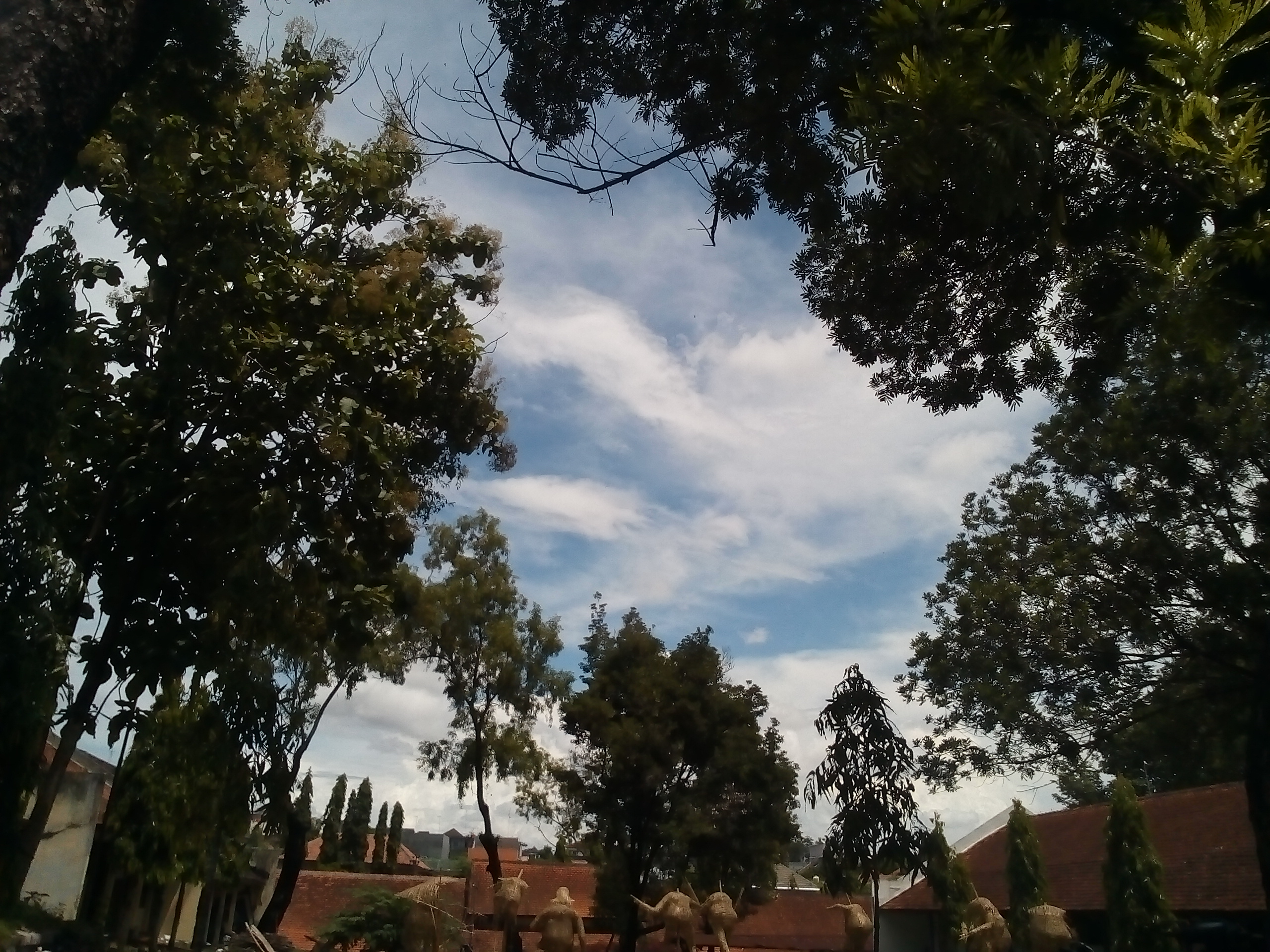 Jawa: Langit biru ning Kampus Ngoresan kang éndah lan wit-witan kang ijo.